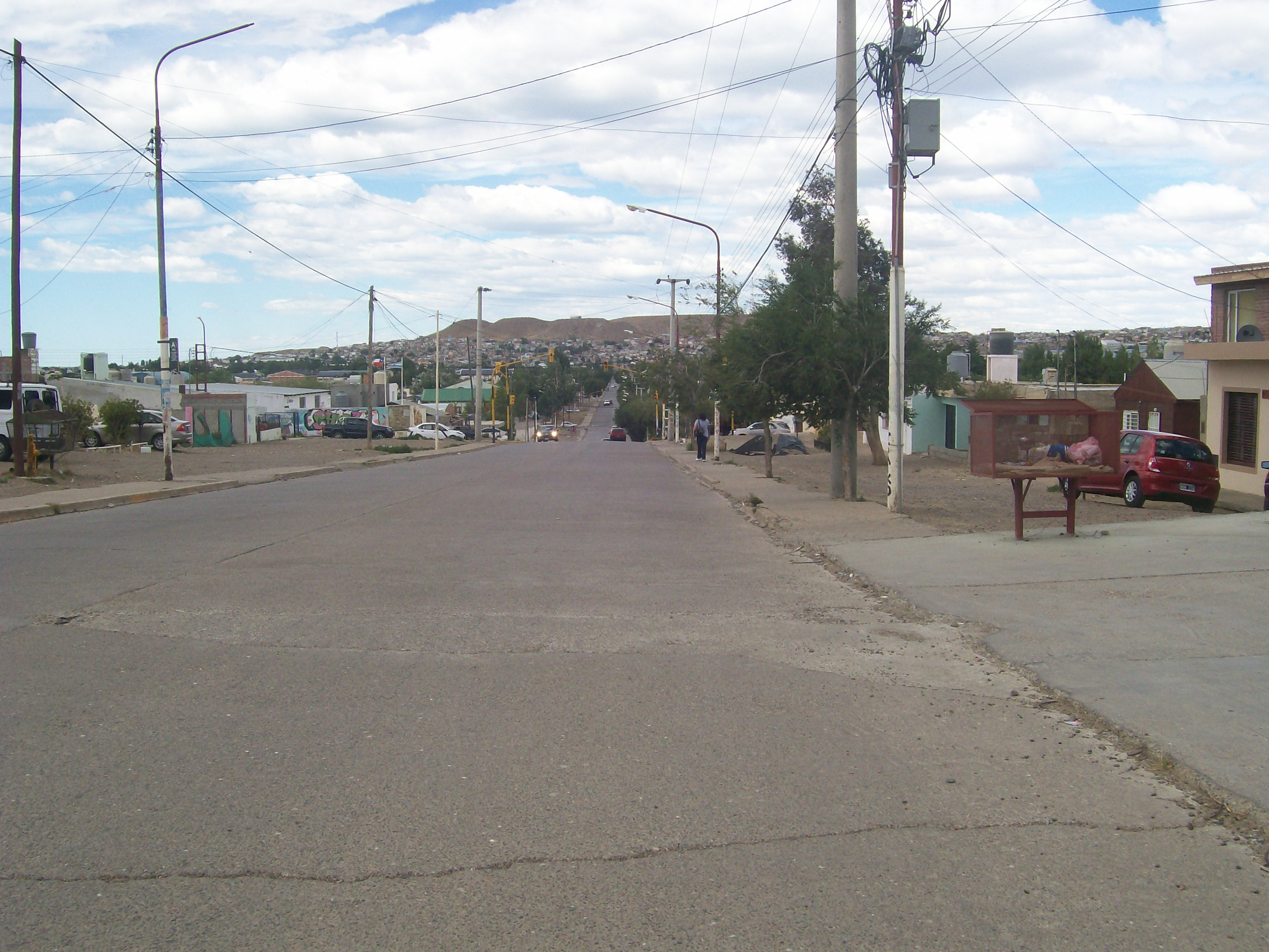 Vista a la Avda. Tierra del Fuego